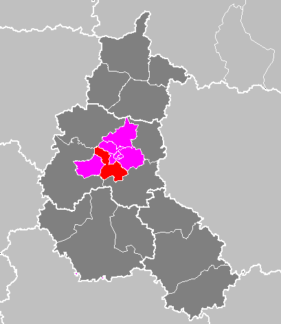 Maps of arrondissements and cantons of France: Arrondissement de Châlons-en-Champagne - Canton d Écury-sur-Coole.PNG